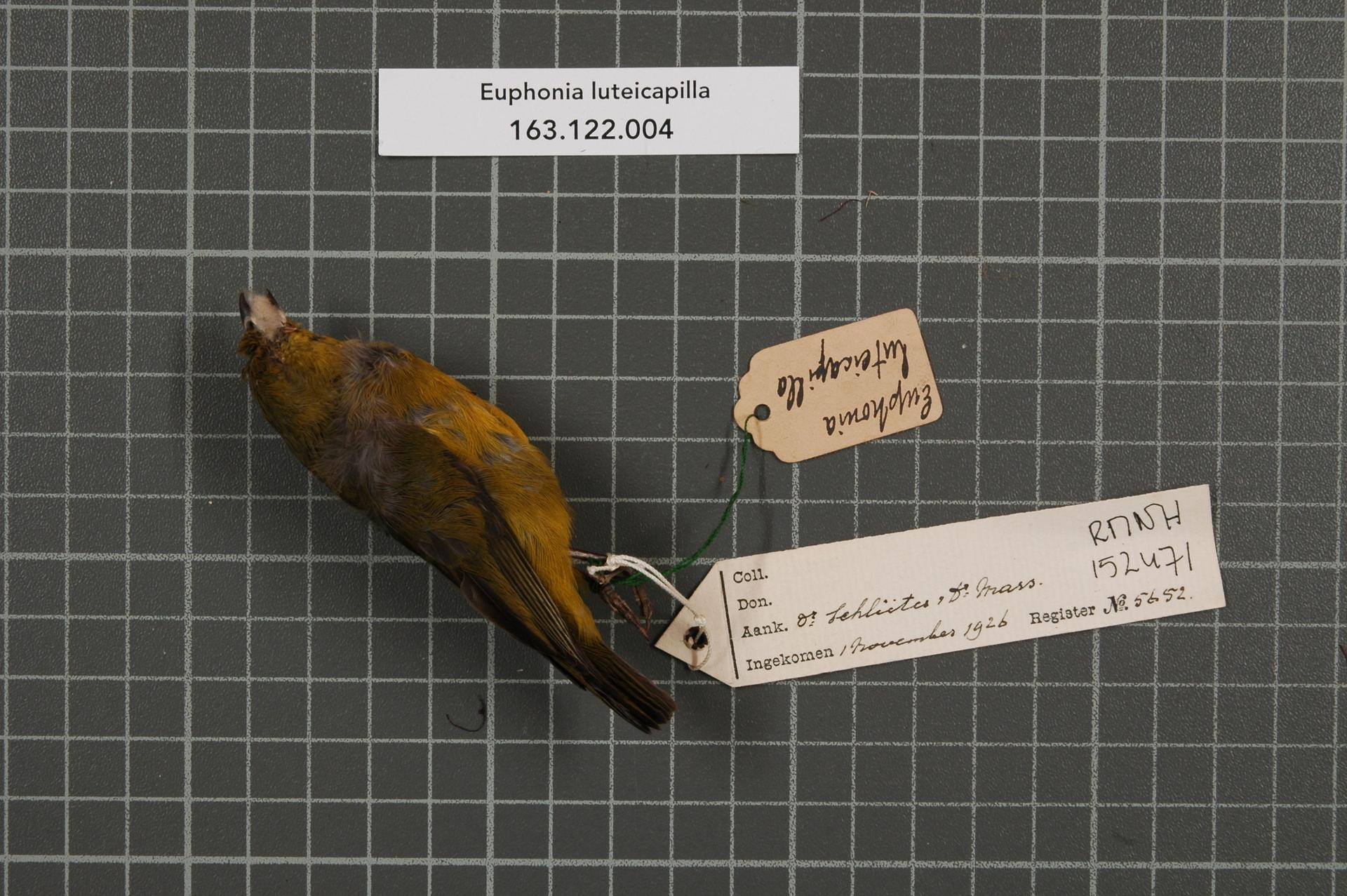 Euphonia luteicapilla (Cabanis, 1860)